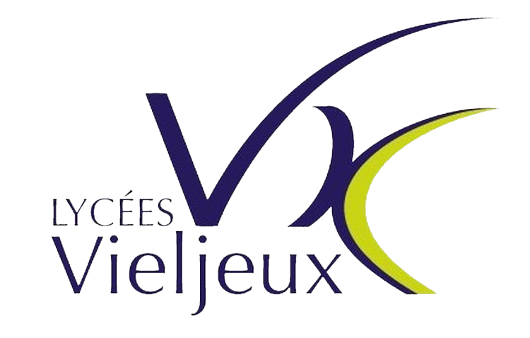 Logotype du lycée